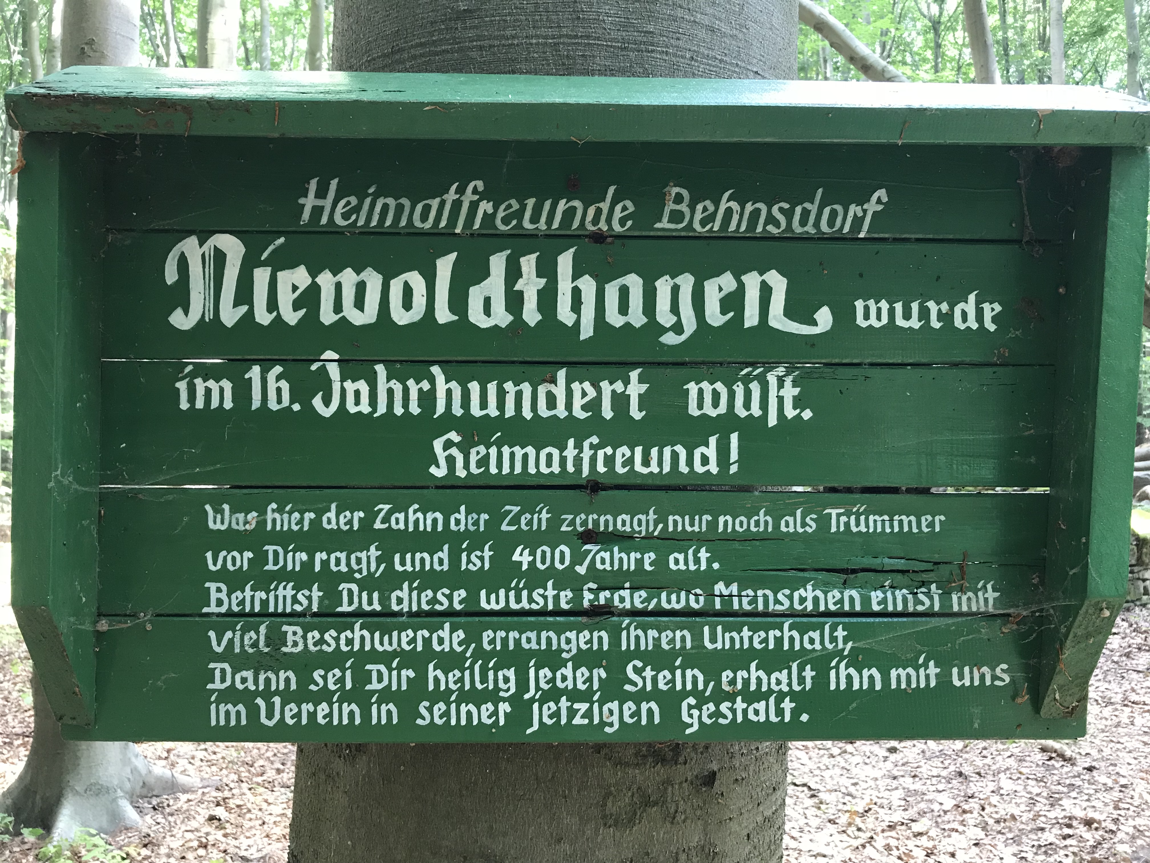 Nievoldhagen